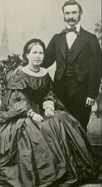 Kathinka and Adalbert Lehmann in 1863